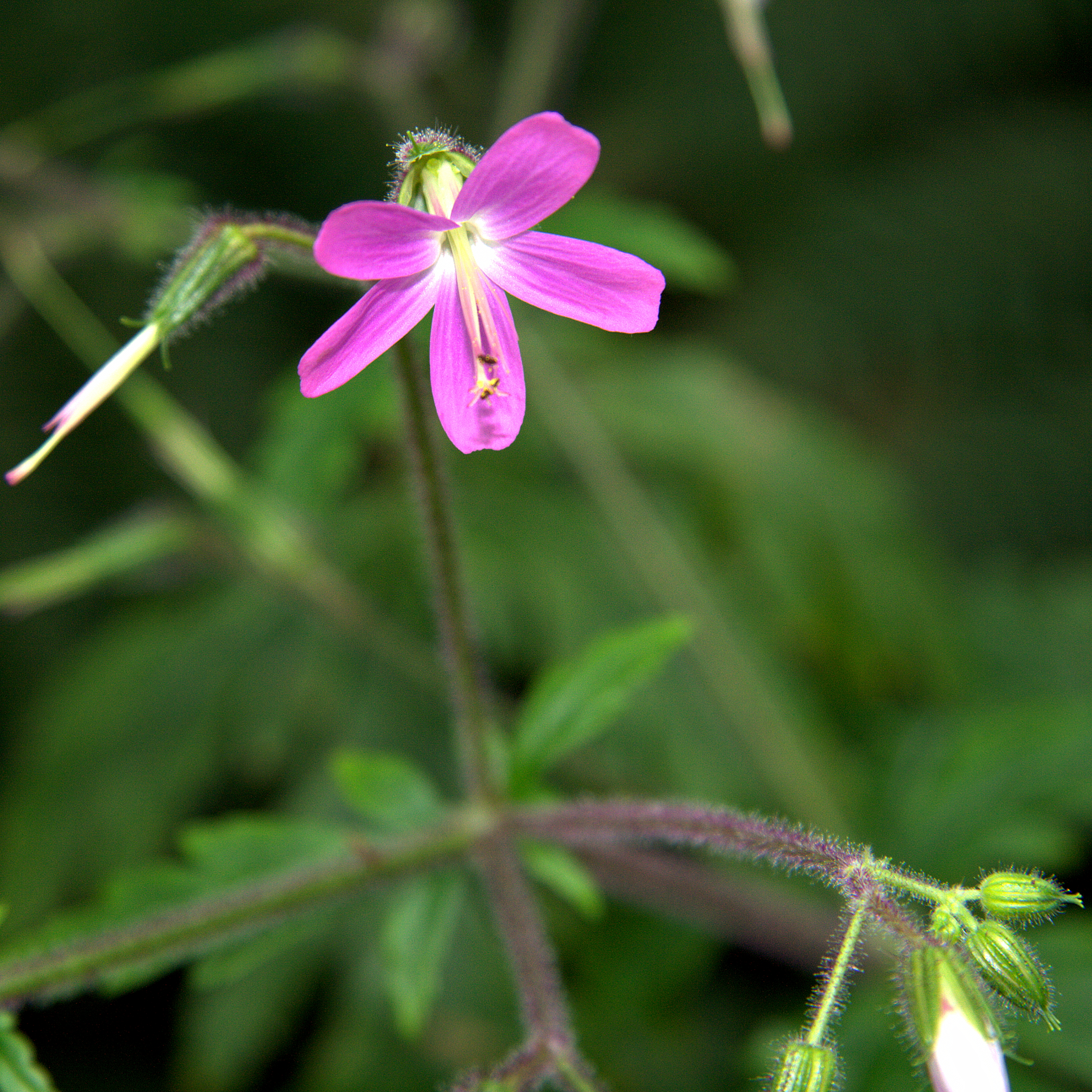 Geranium canariensis